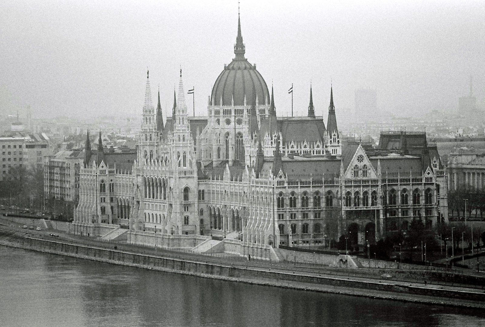 Országház (Budapest 5, Kossuth Lajos tér 1-3., Széchenyi István rakpart 11.) This is a photo of a monument in Hungary. Identifier: 509